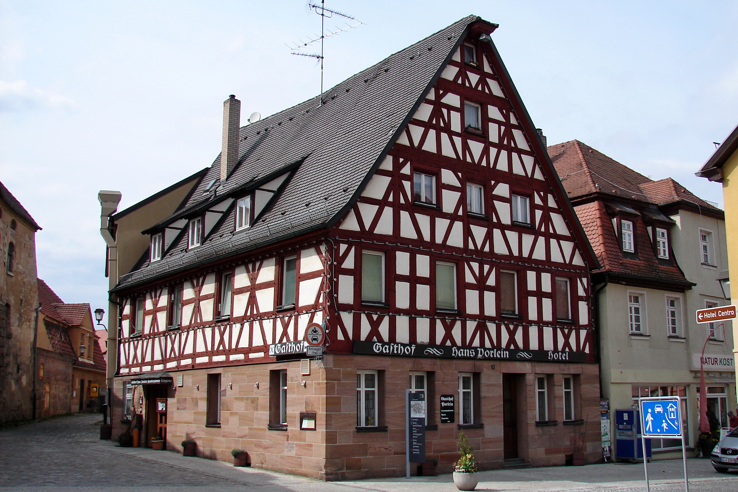 Gasthof mit Fachwerkobergeschoss und -giebel, Ende 17./Anfang 18. Jh.